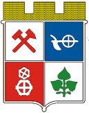 znak města